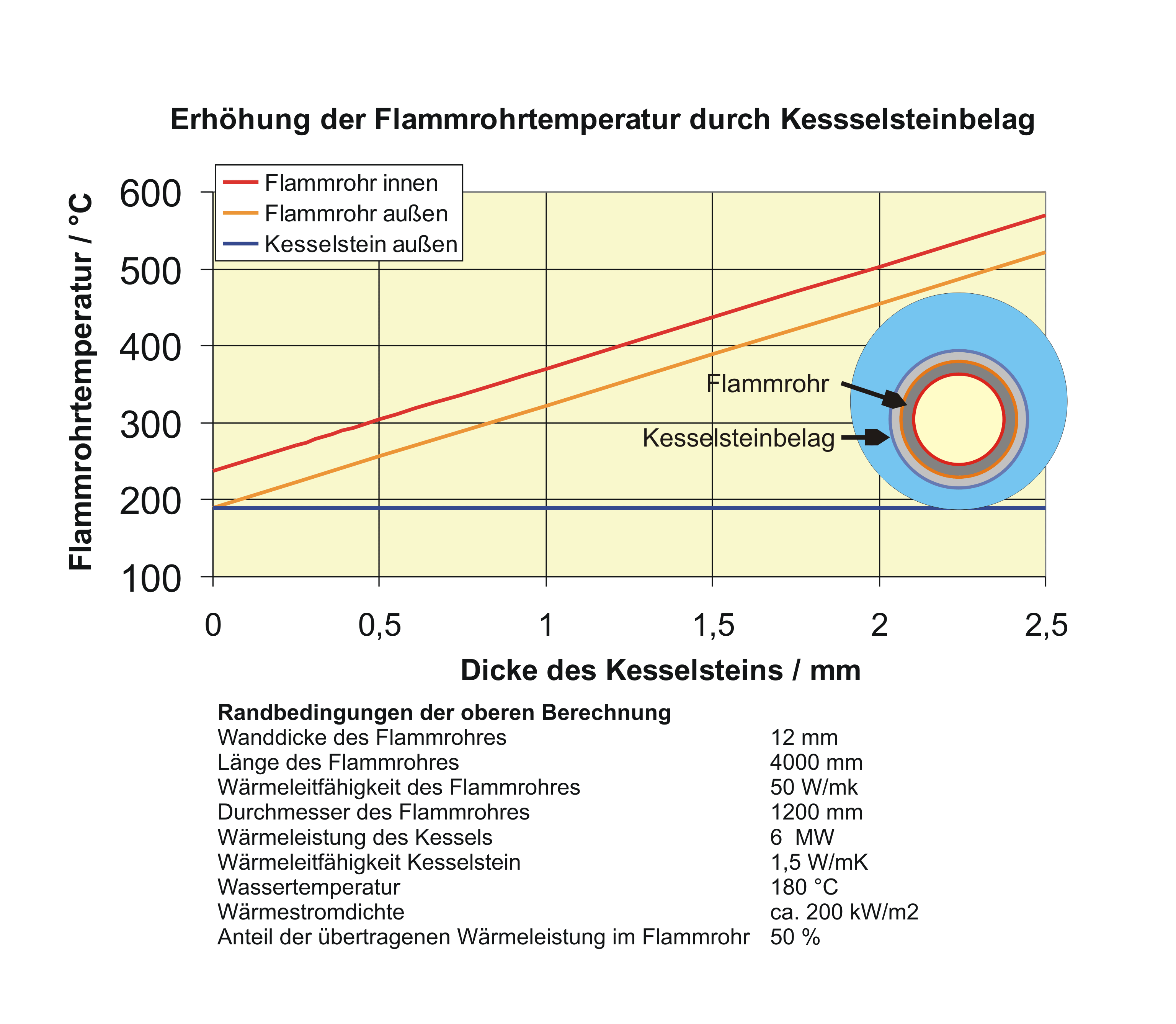 Diagramm mit der Darstellung der Temperaturerhöhung eines Flammrohres durch Kesselsteinablagerungen